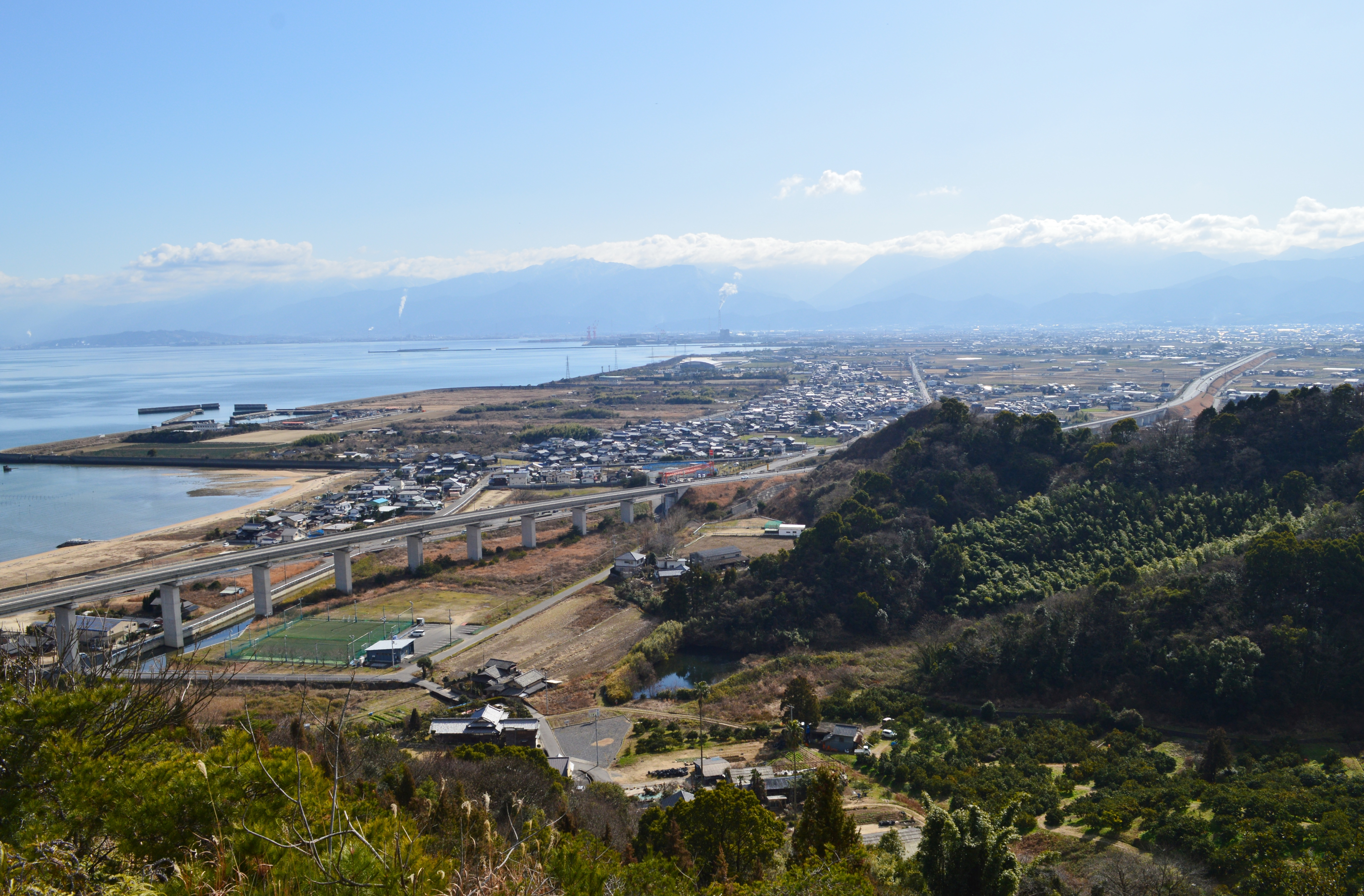 永納山から今治小松自動車道を望む